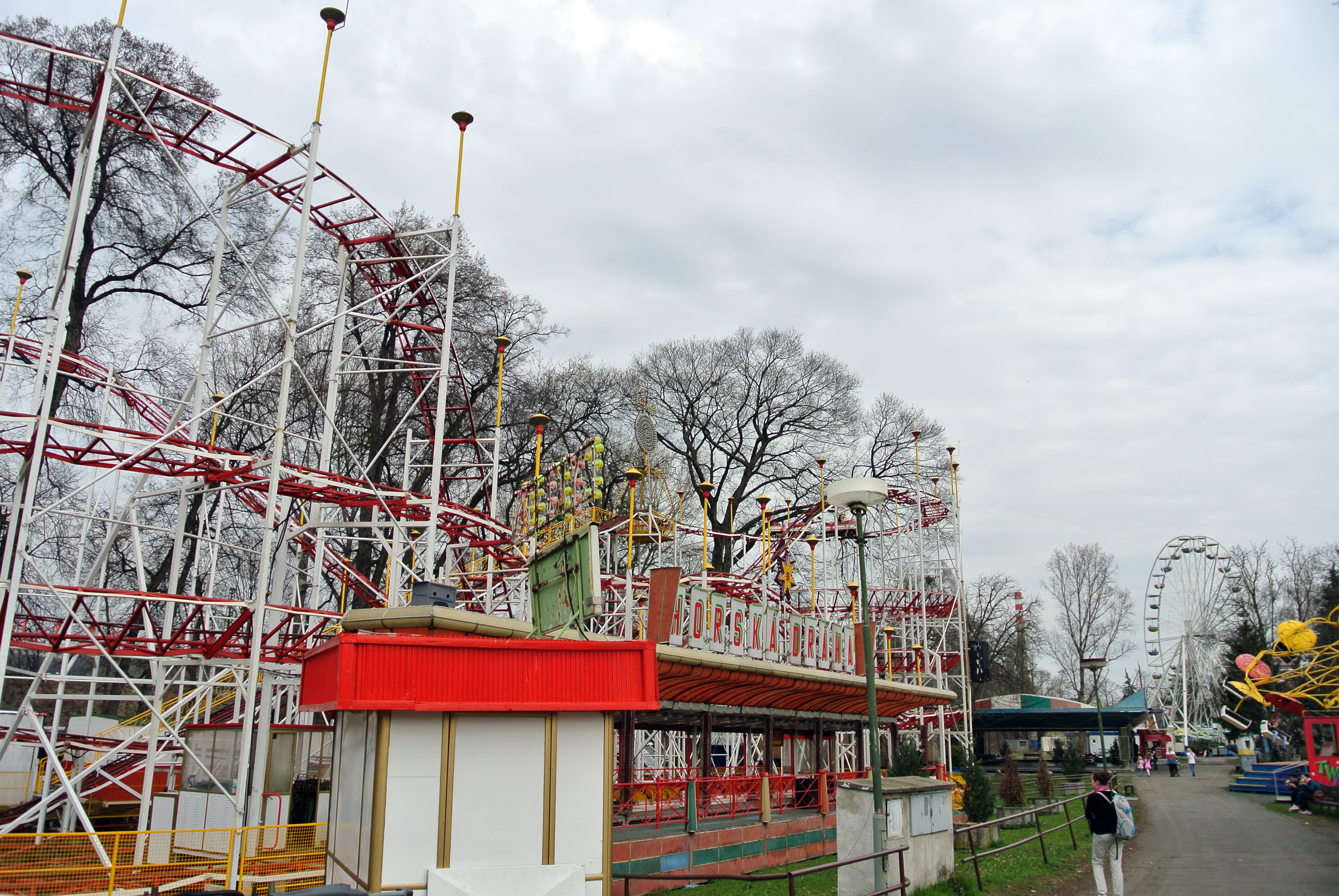 Česky: Horská dráha na Výstavišti